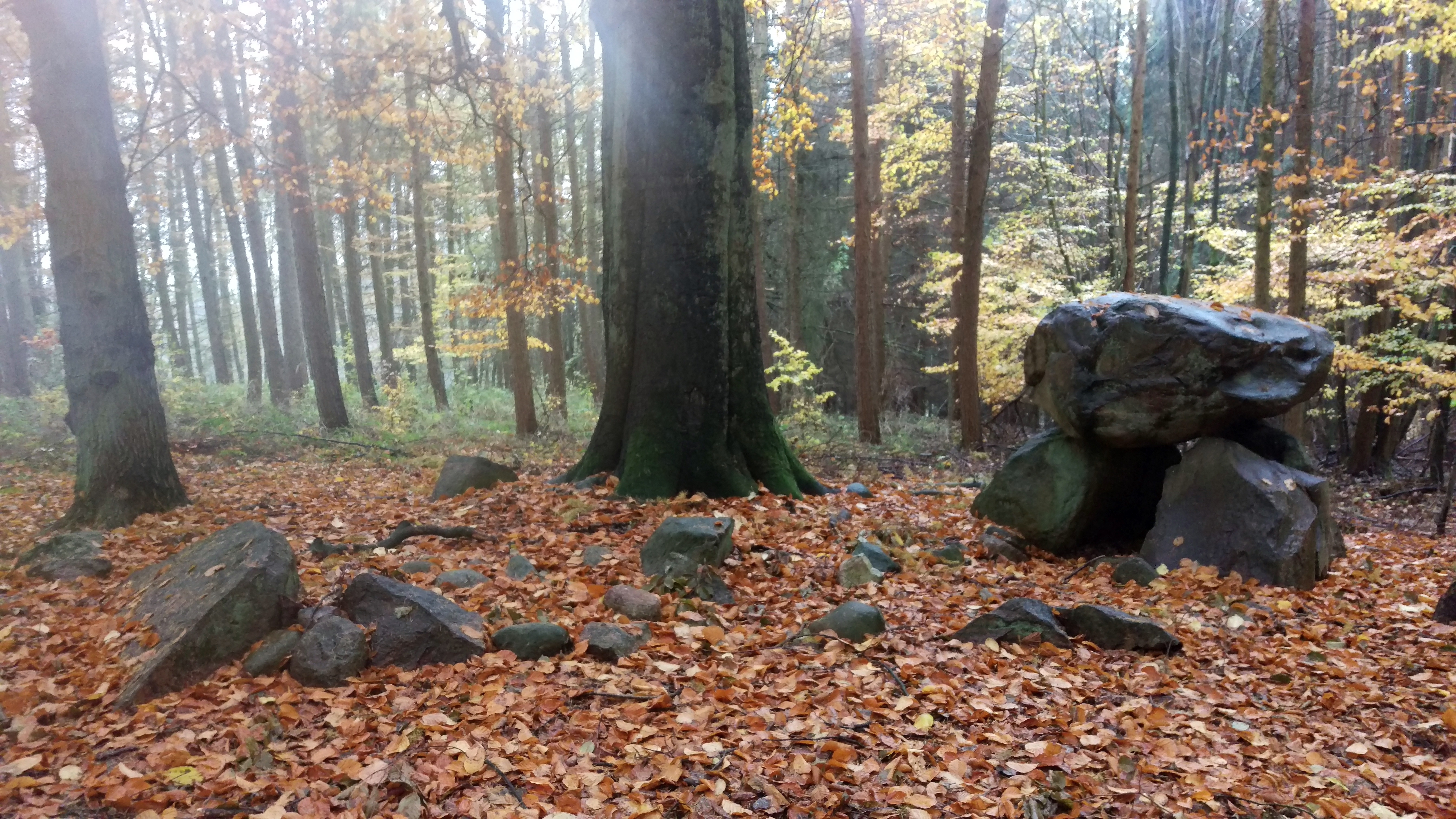 Das “Großsteingrab Klein Hundorf 2”, eines von drei Großsteingräbern bei Klein Hundorf im Wald östlich der Radegast, Sprockhoff-Nummer: 317